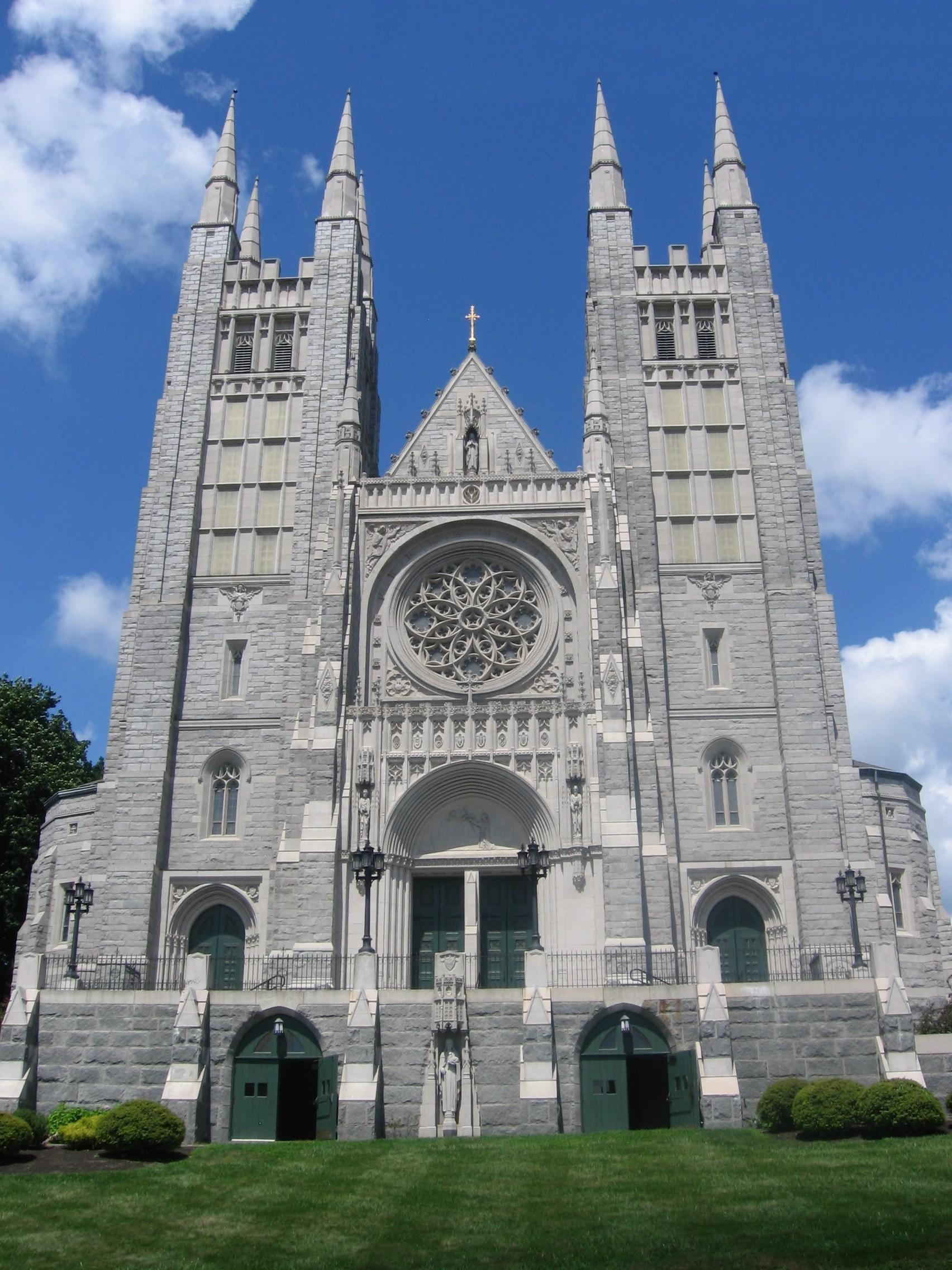 Basilique Saint-Pierre et Saint-Paul à Lewiston, Maine